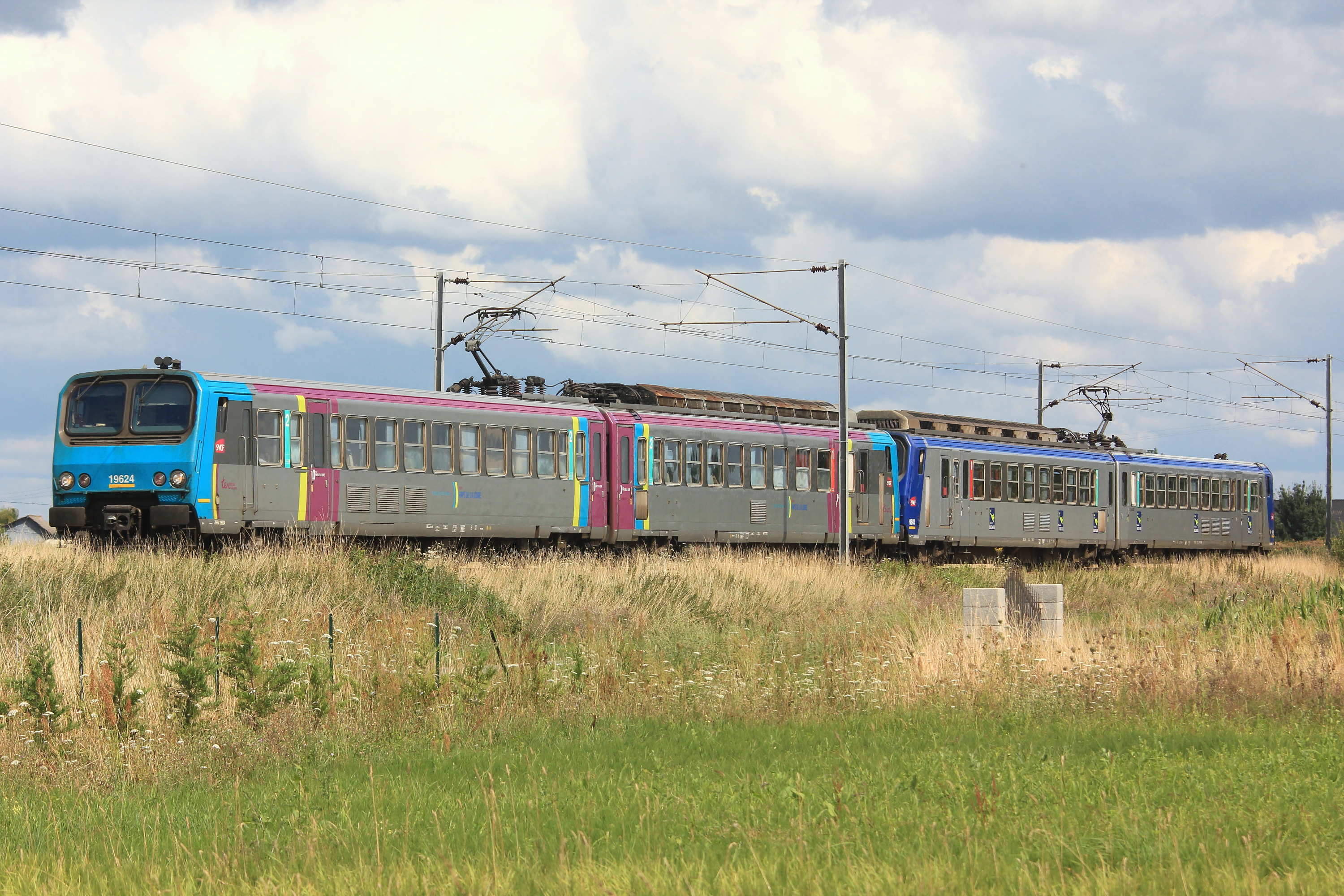 La Z 9624 (livrée TER Pays de la Loire) et la Z 9603 (livrée TER institutionnel) près de la gare de La Bohalle.